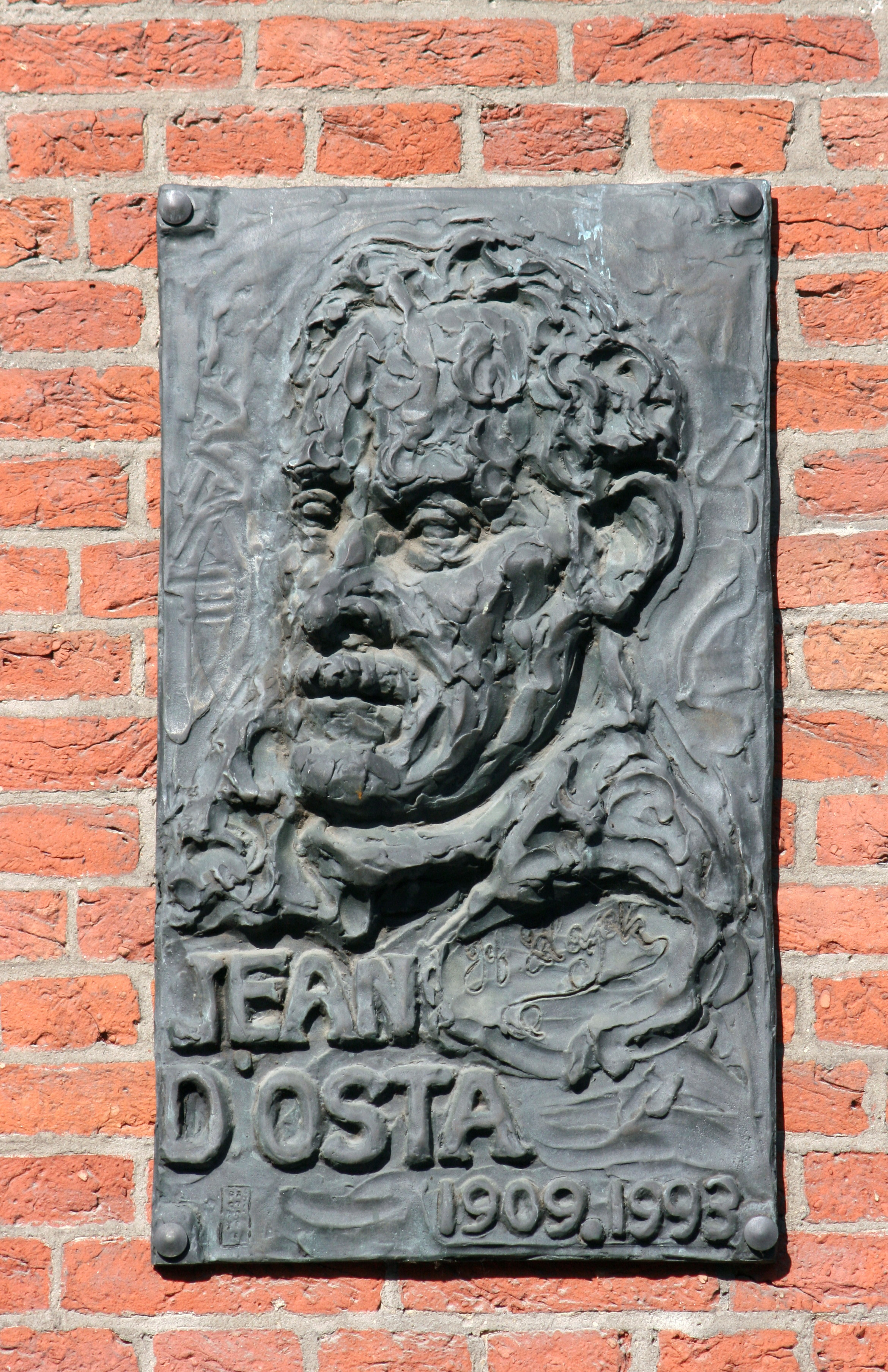 Plaque commémorative de Jean d'Osta, auteur de livres sur Bruxelles, sur la façade de l'église Notre-Dame-Immaculée, place du Jeu de Balle à Bruxelles, Belgique